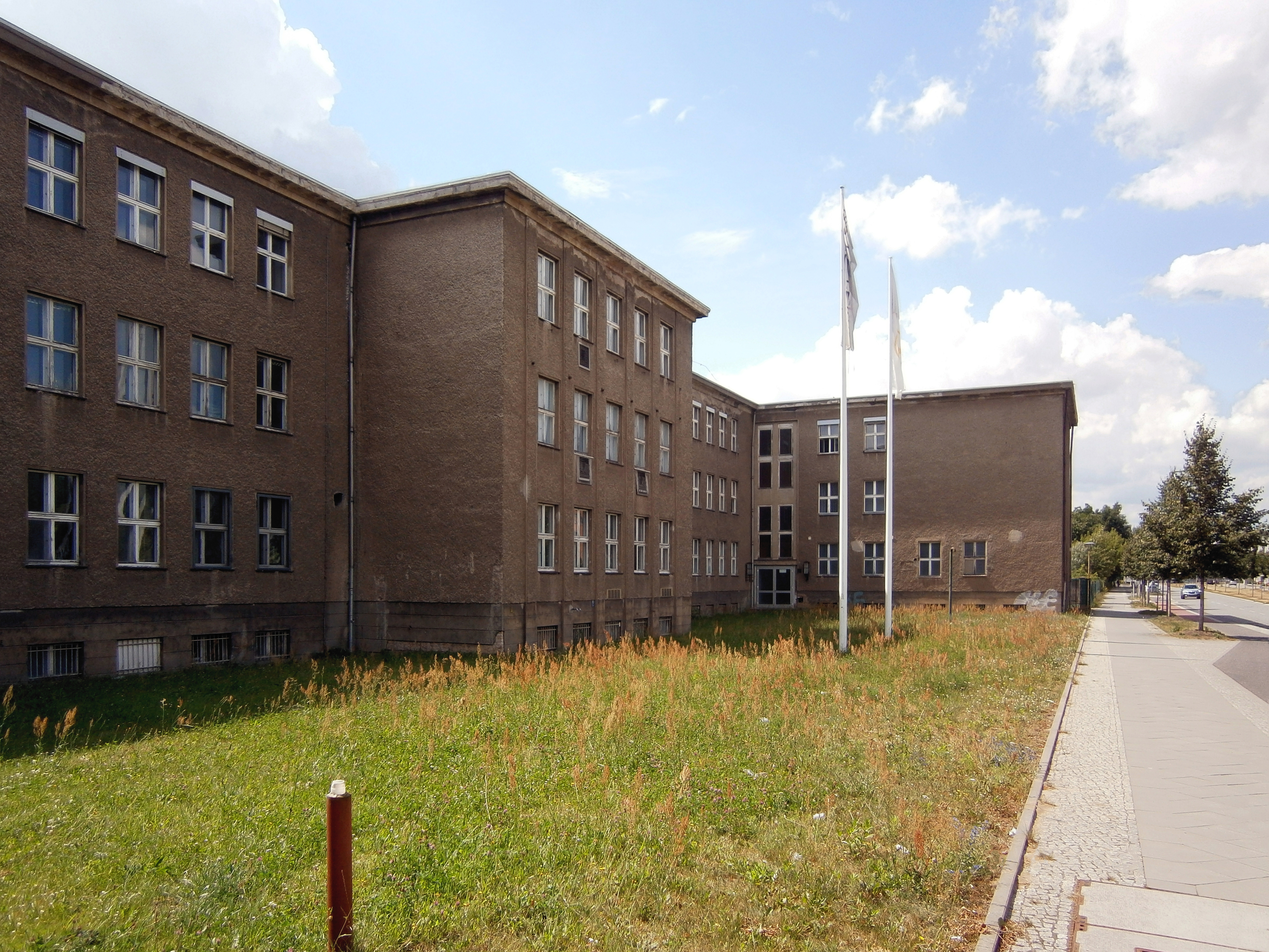 Der Groß-Berliner Damm ist eine Straße in Berlin-Johannisthal. Hier altes, ungenutztes Gebäude auf der Straßensüdseite, Blick westwärts. Vormals zum Ministerium für Staatssicherheit gehörig.